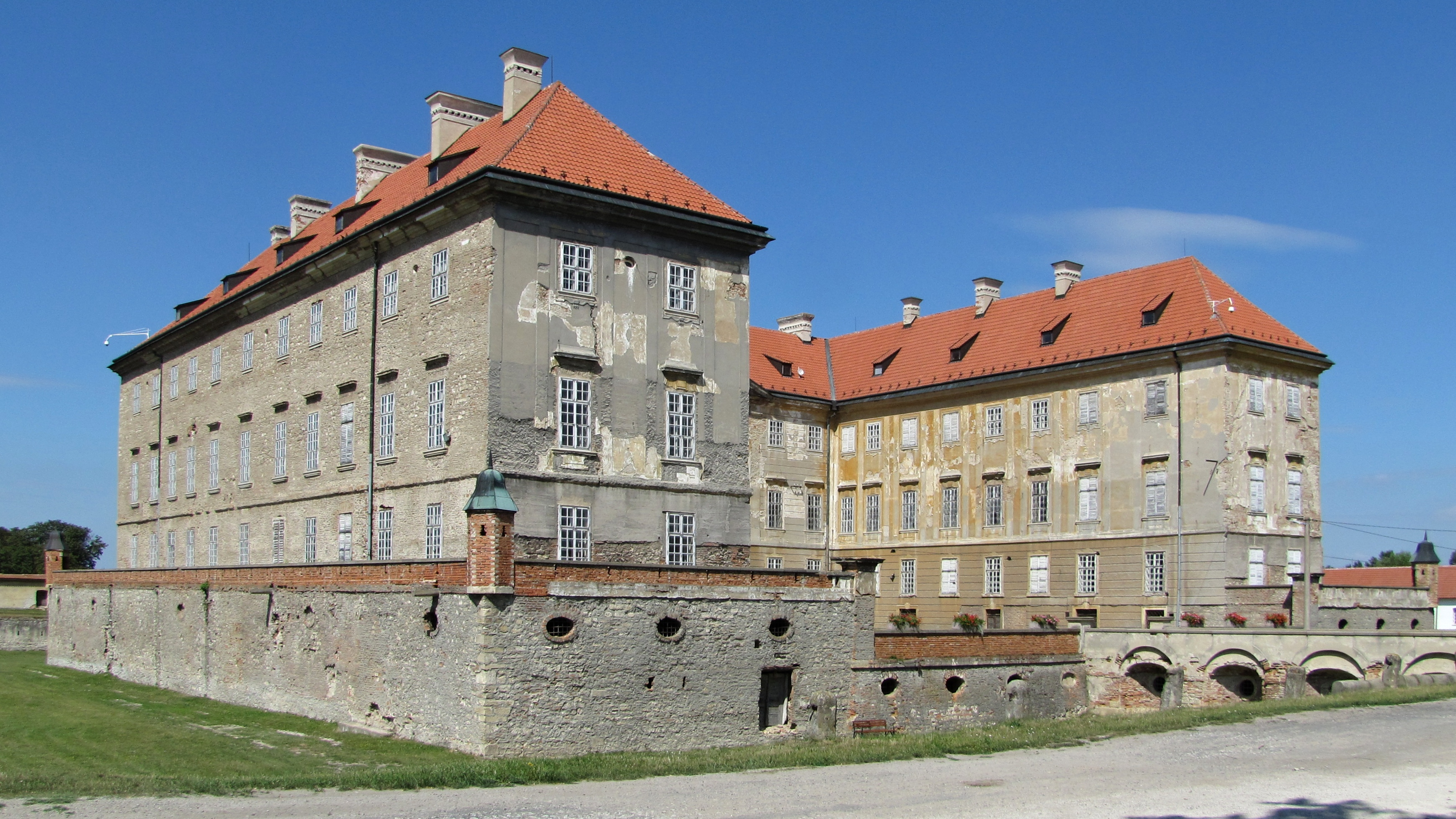 Holíčský zámek